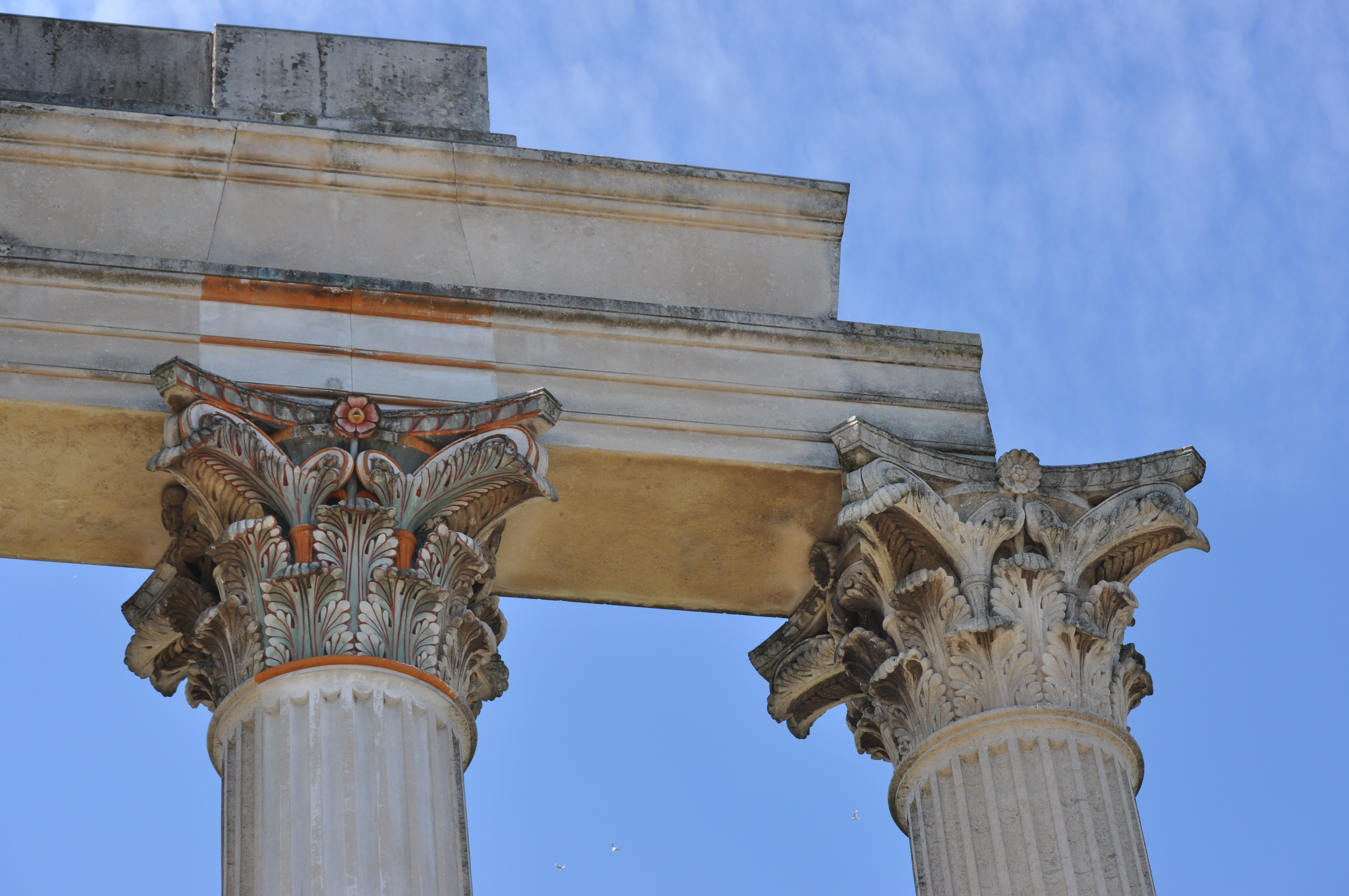 Detalle del Templo del Puerto (reconstrucción parcial)